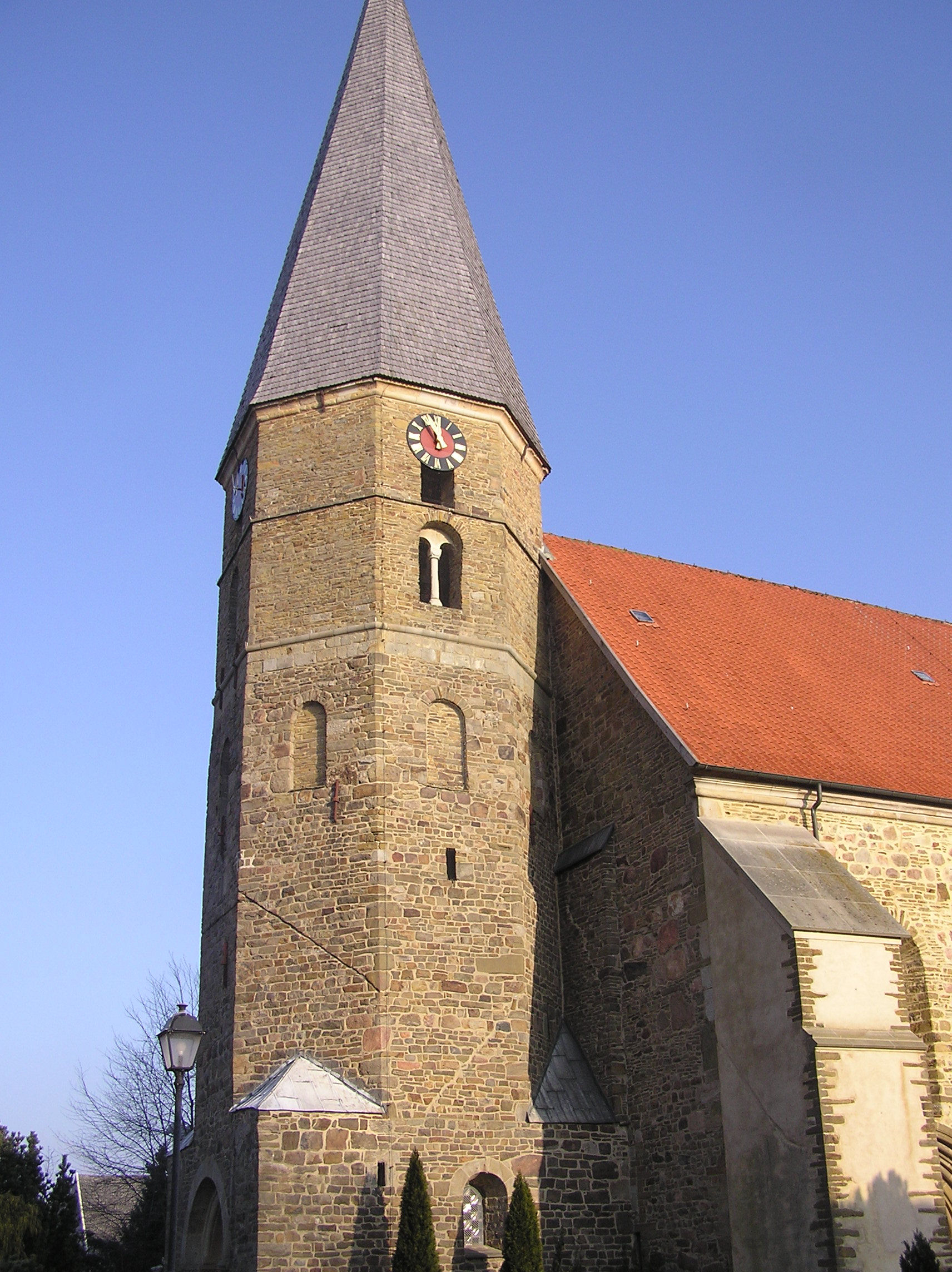 Pfarrkirche St.-Georg in Badbergen